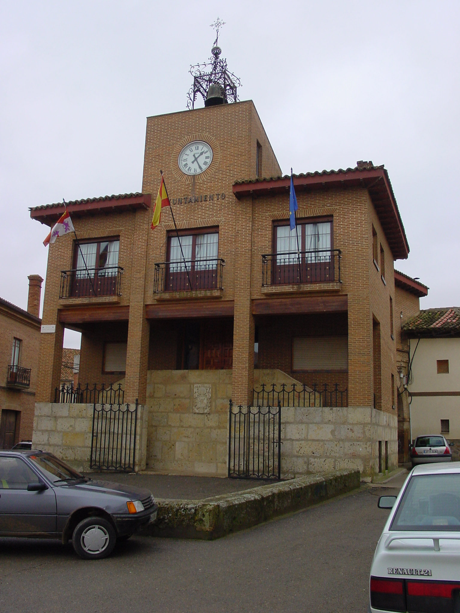 Valderas (León, España). Ayuntamiento nuevo Autor de la imagen: Lourdes Cardenal, enero 2006.